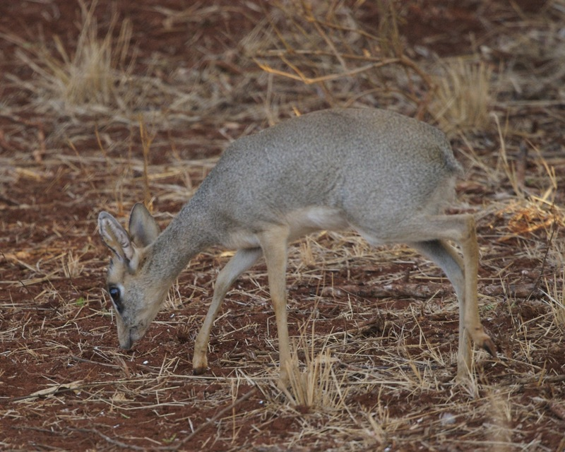 Dik-dik Madoqua gunther Tsavo East, Kenya 25th. August 2008 690V9967